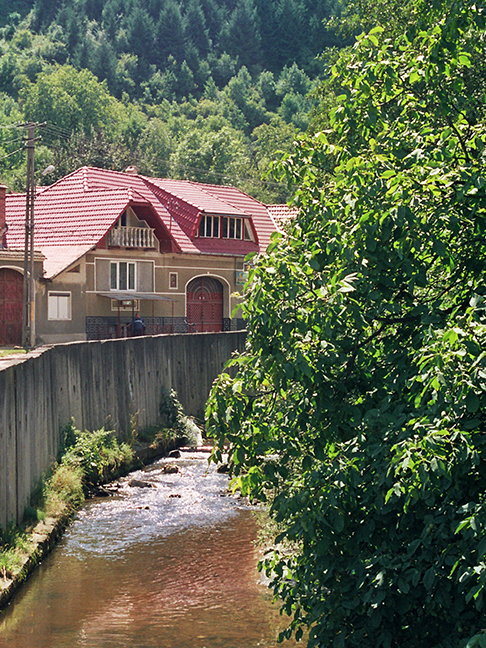 Cibin